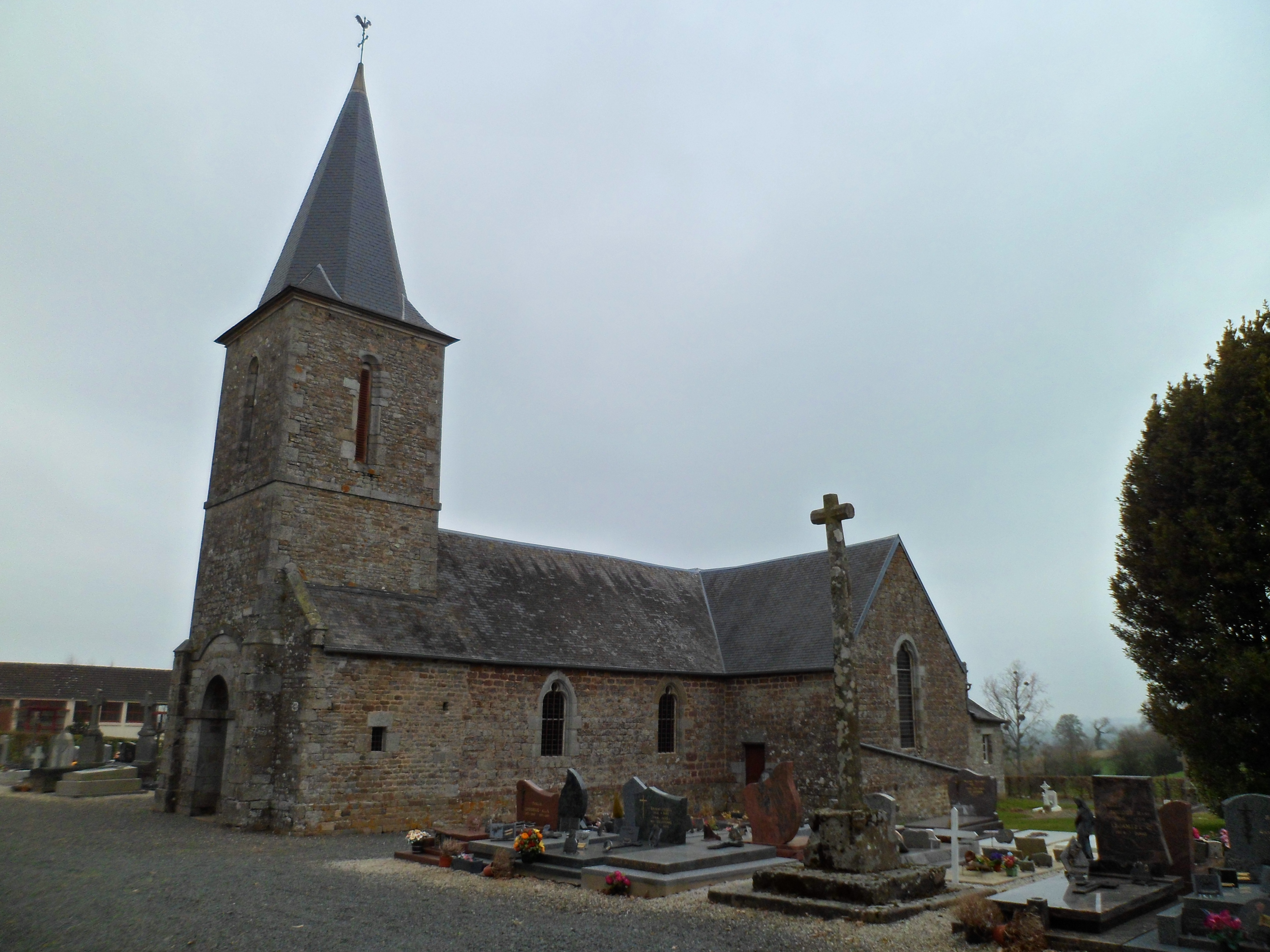 Église Saint-Pierre de Maupertuis (Manche)